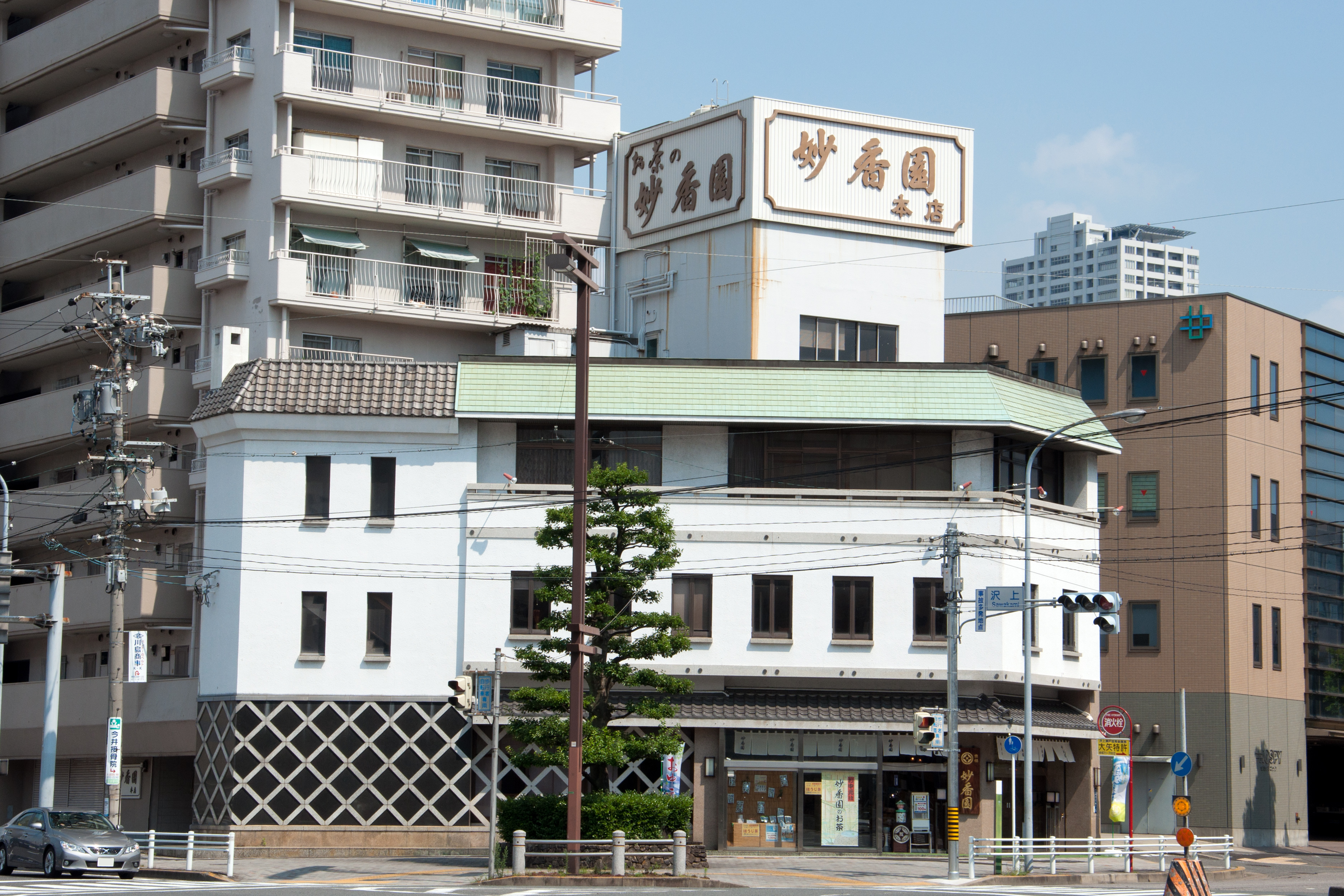 名古屋市熱田区にある妙香園本店